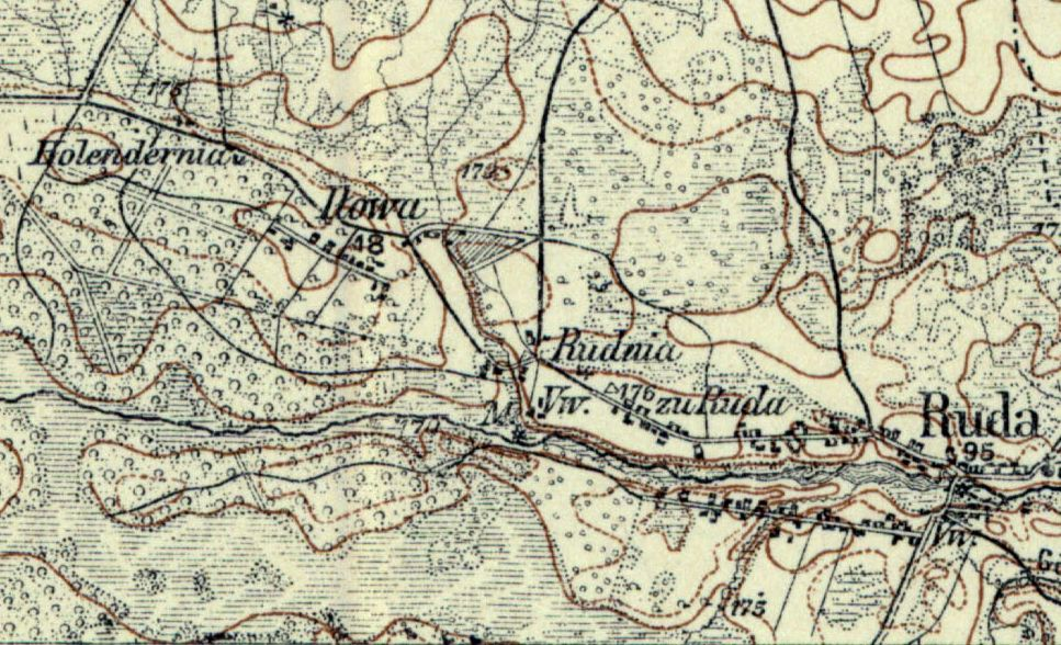 Iłowa i Rudnia (powiat chełmski) na mapie Rosji Zachodniej (Karte des westlichen Rußlands) z 1915 r.